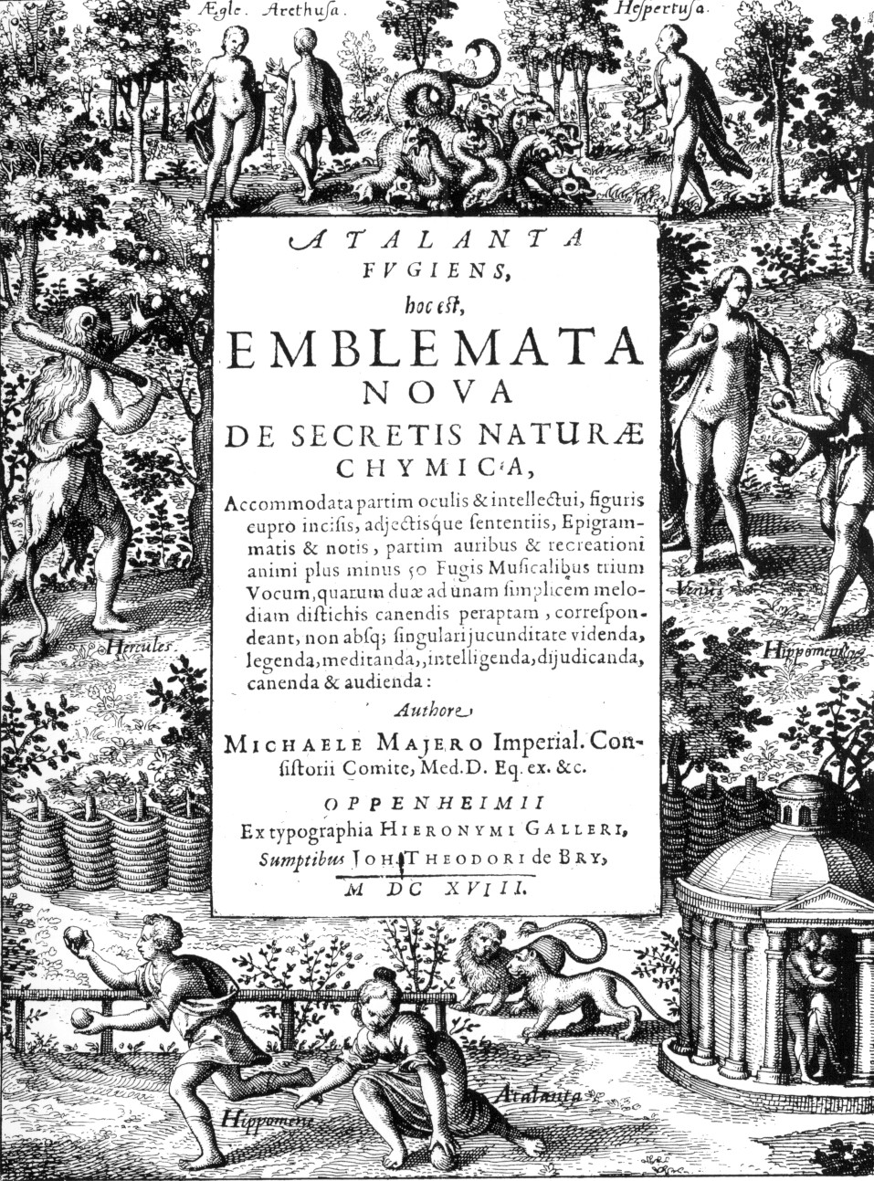 Page de couverture de l'Atalanta Fugiens